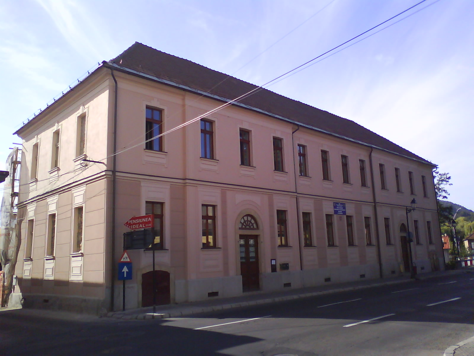 Şcoala confesională, azi Şcoala ajutătoare nr. 1 - Baia Mare